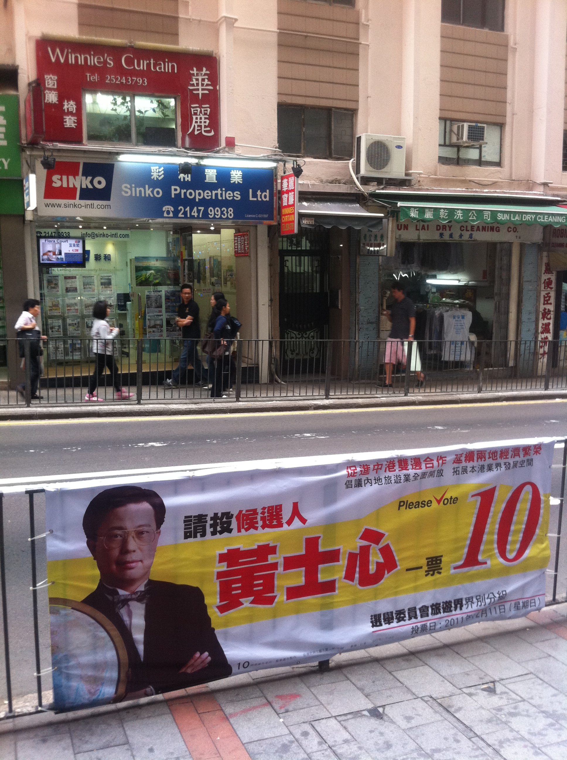 中文（香港）: 堅道 黃士心 2011年香港選舉委員會界別分組選舉 橫額